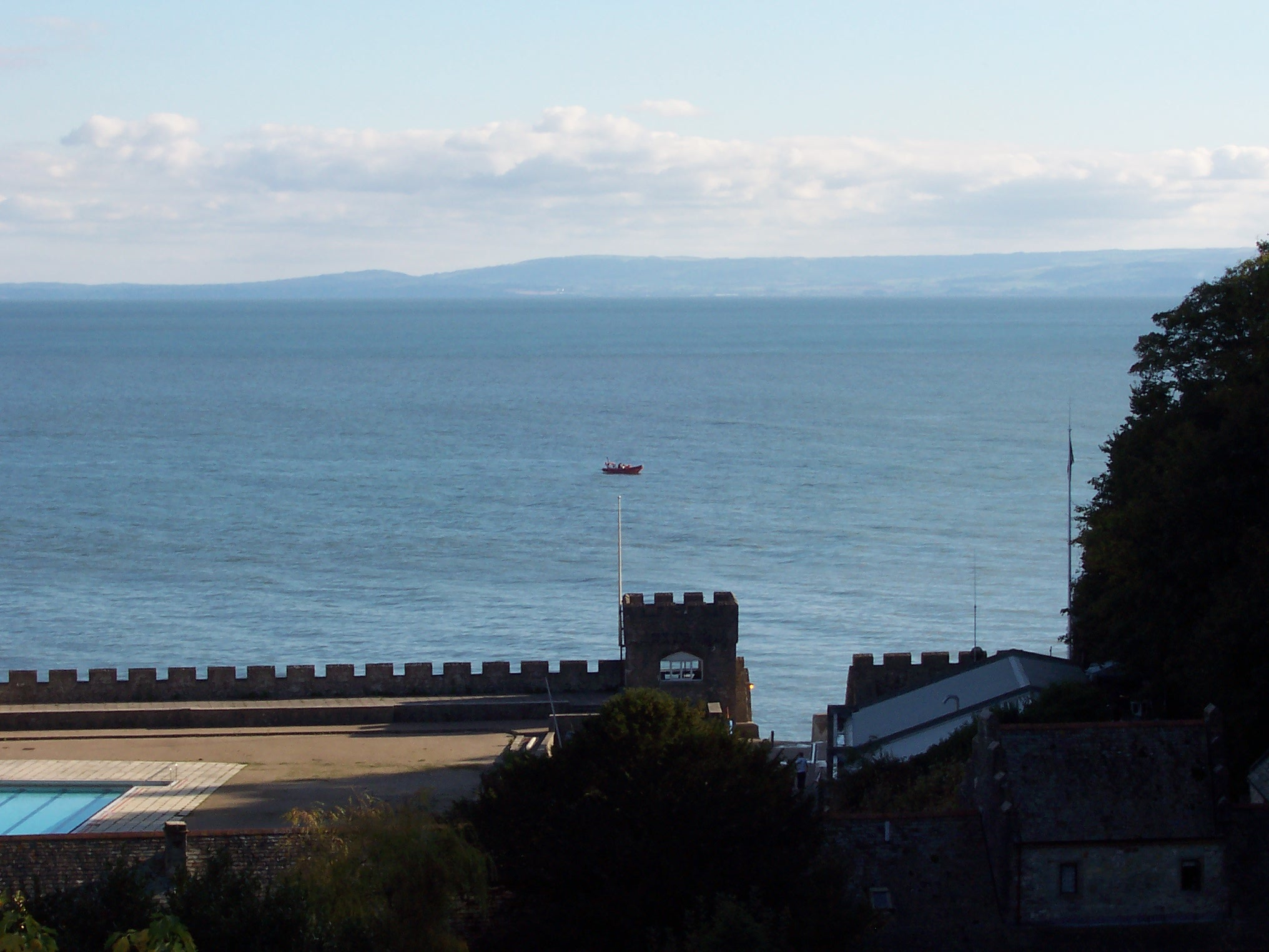 Pohľad na Seafront a Bristolský záliv